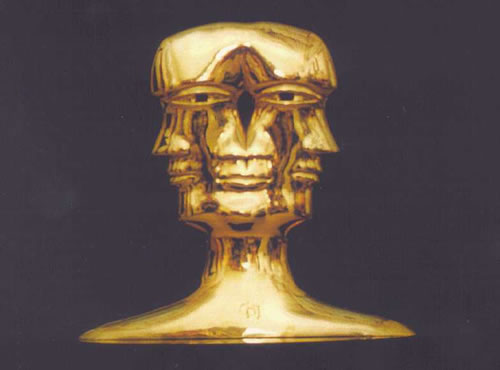 Enigma